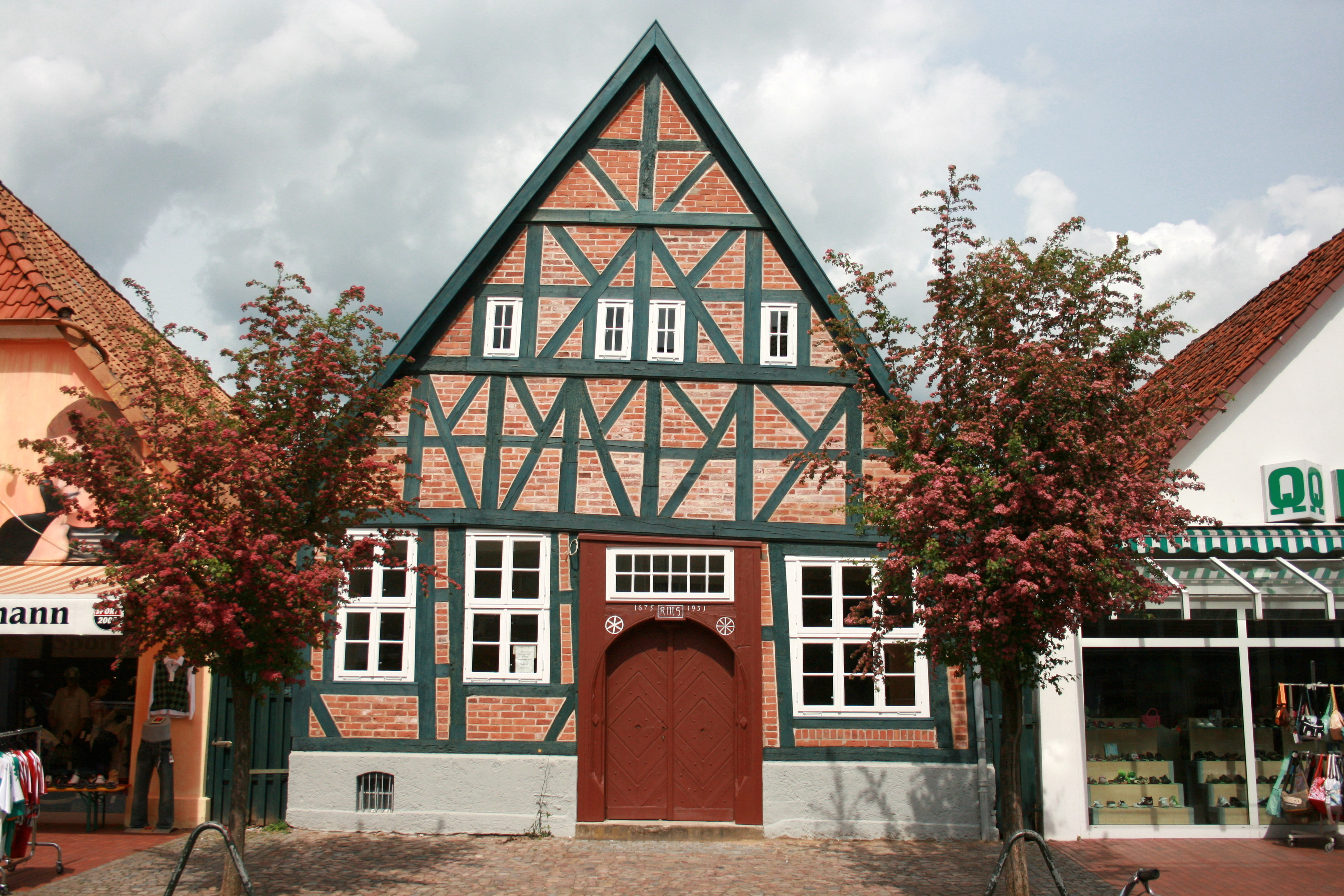 Rudolf-Schäfer-Haus, Große Straße in Rotenburg (Wümme)